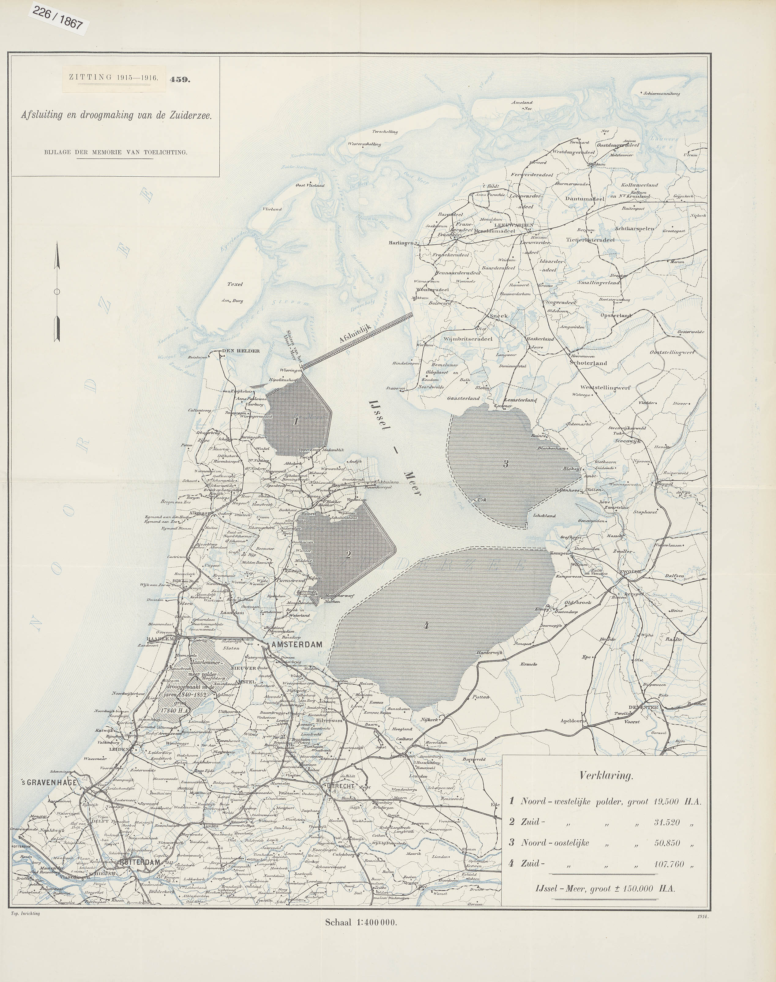 Op de kaart zijn mogelijk toekomstige afsluitdijken tussen Wieringen en Terschelling en tussen Friesland en Terschelling volgens het plan van de heer M.C.E. Bongaerts ingetekend. Tevens zijn de benodigde waterstaatkundige werken weergegeven. Behoort bij het verslag der Commissie ingesteld bij beschikking van den Minister van Waterstaat van 1 november 1913 La. Afd. Waterstaat